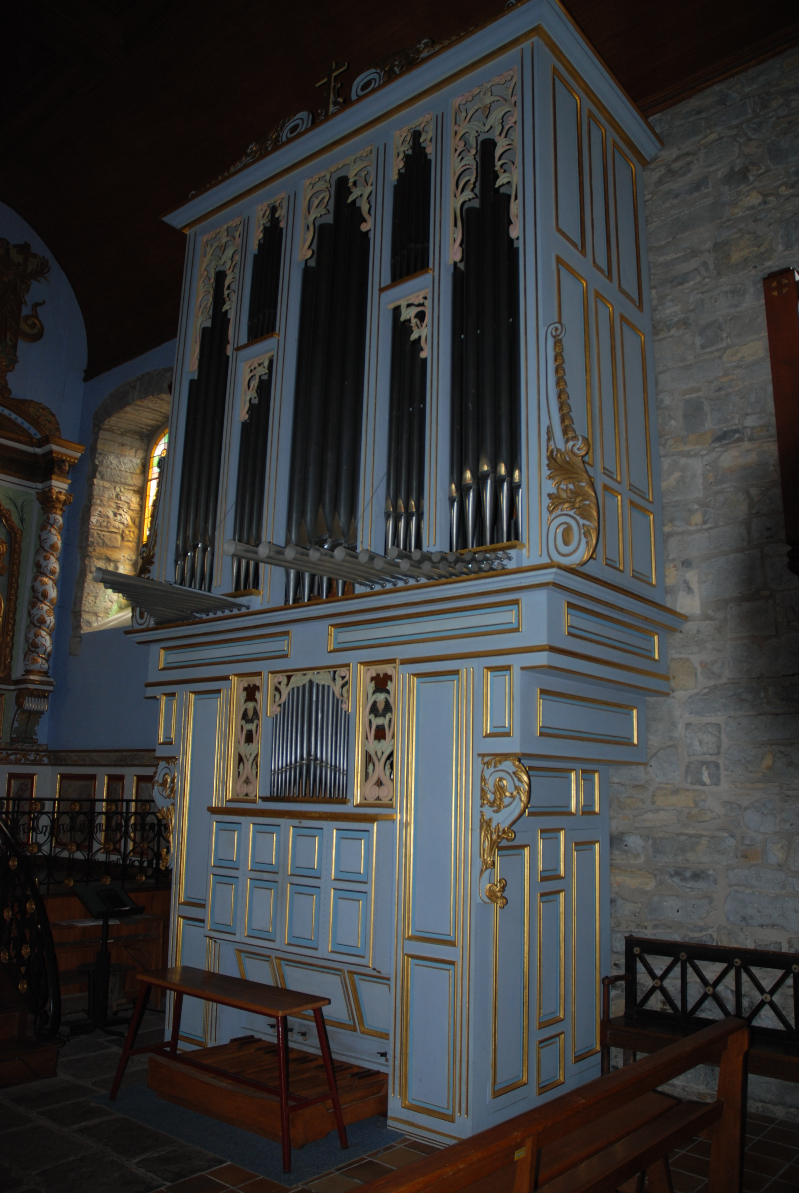 Irissarry, orgue de l'église Saint-Jean-Baptiste